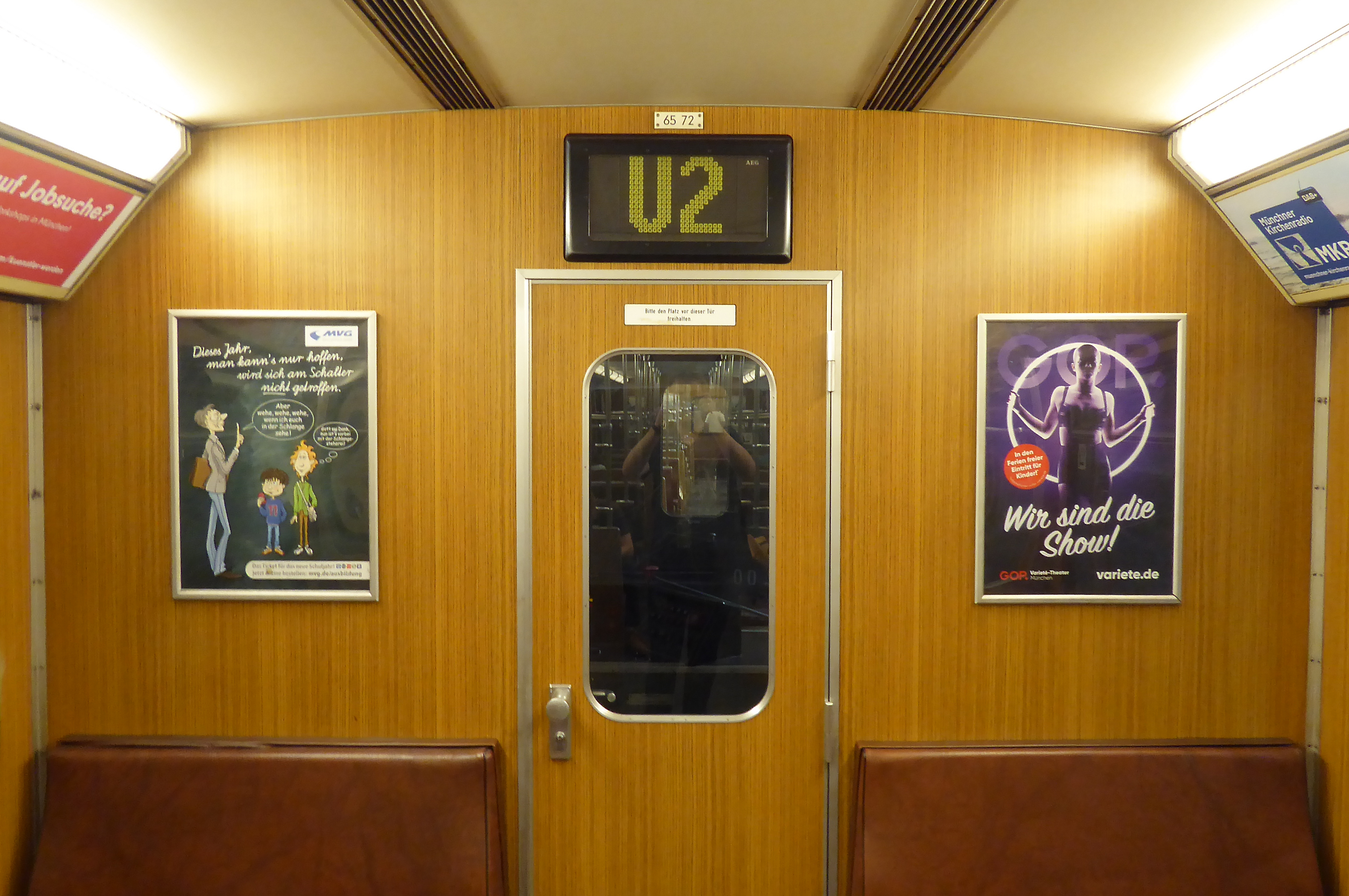 Blick zum Fahrerstand